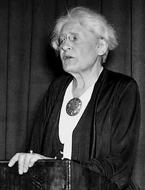 Lydia Wahlström fick ofta uttala sig i tidens frågor och var en anlitad föredragshållare.